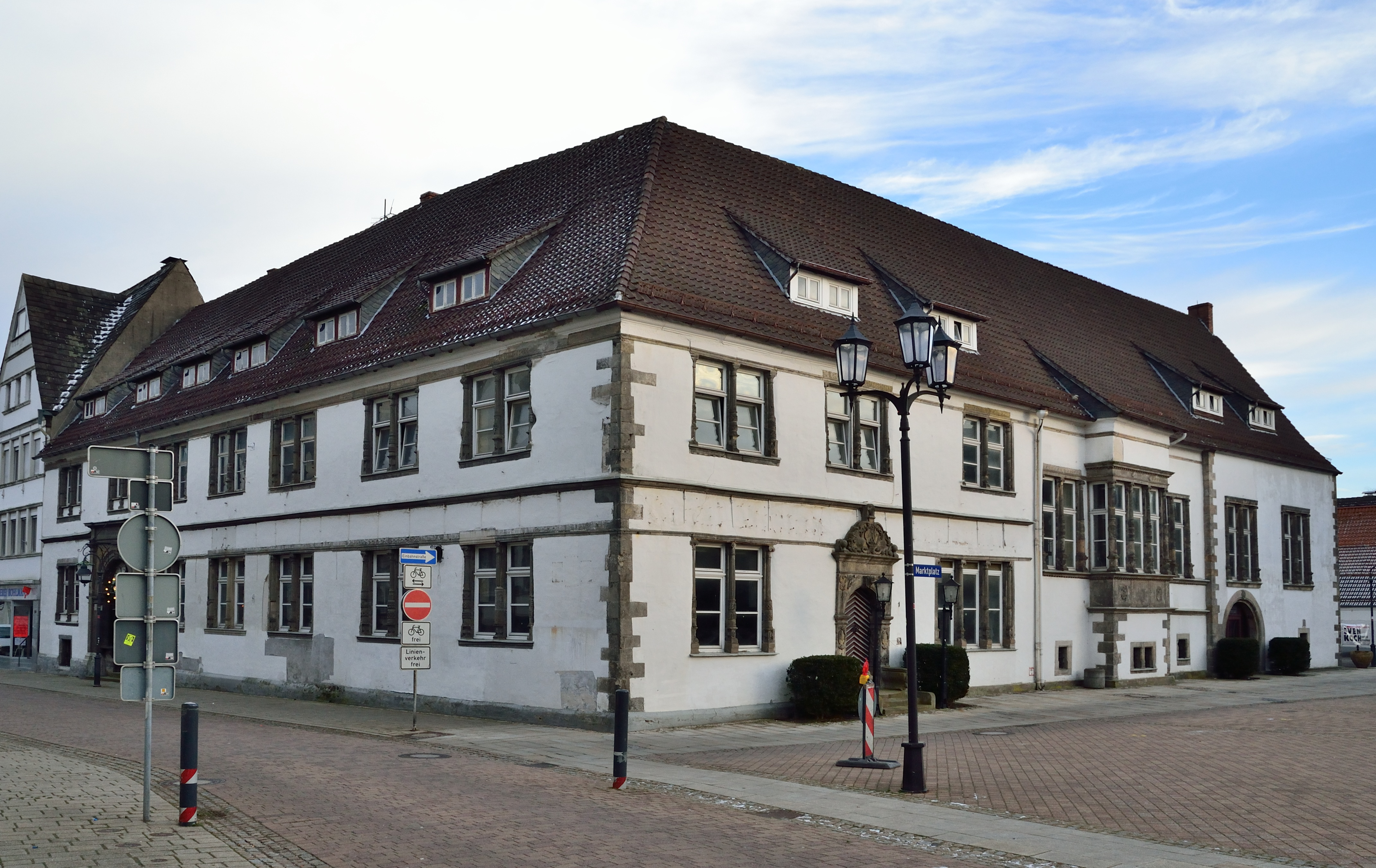 This is a photograph of an architectural monument. .6 Kotzenbergscher Hof, Ansicht von Nord-Westen